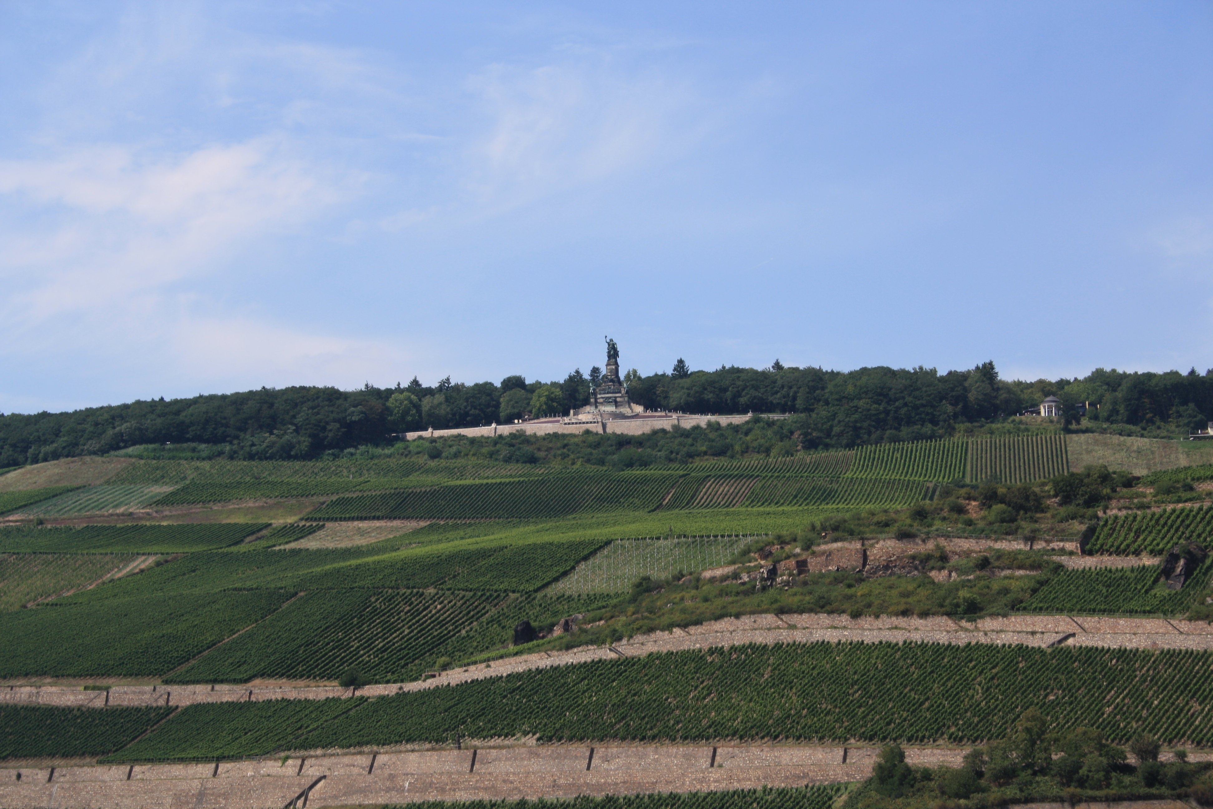 Rüdesheimer Rottland und Niederwalddenkmal, rechts Niederwaldtempel